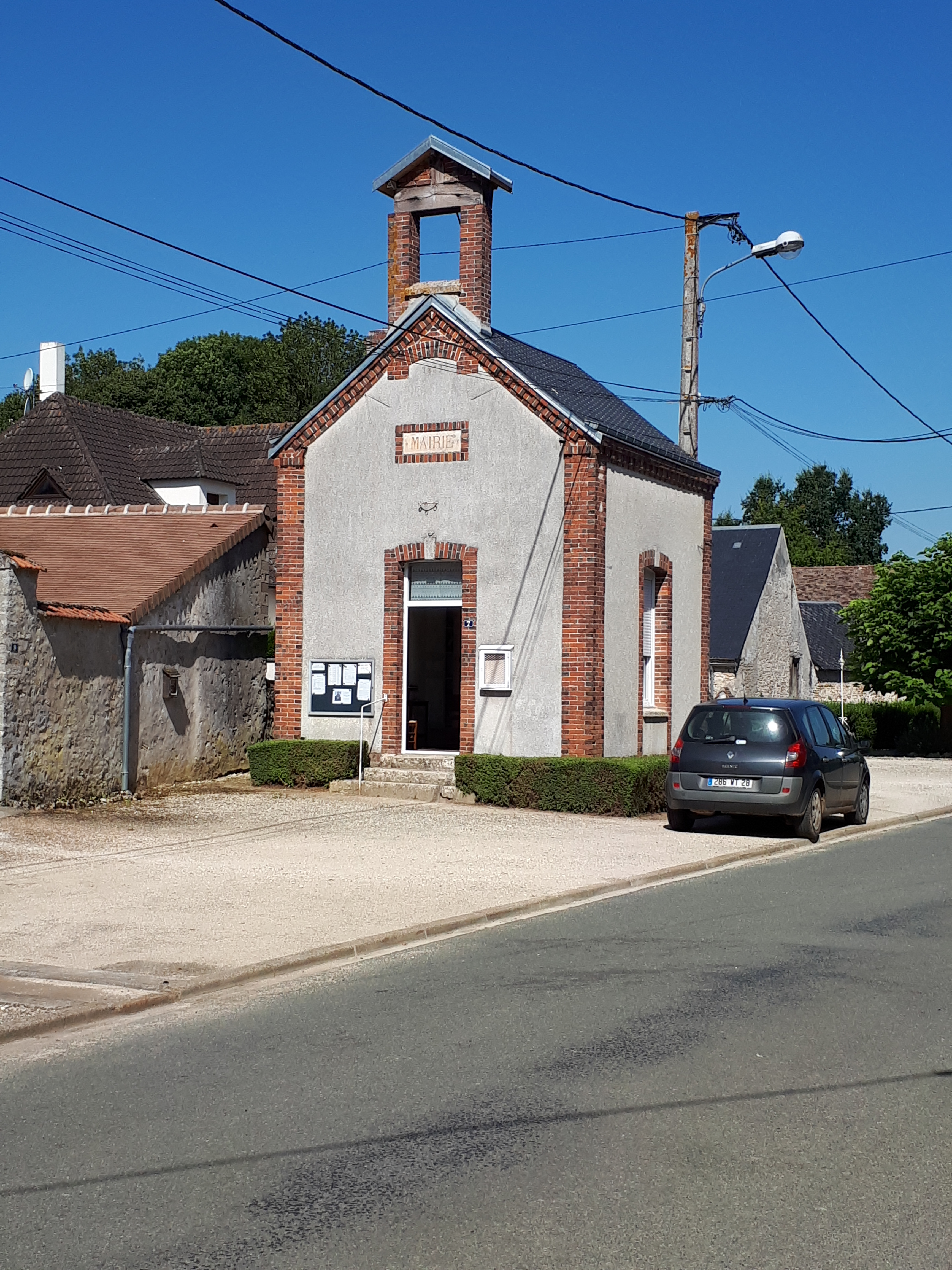 Mairie de Morainville.